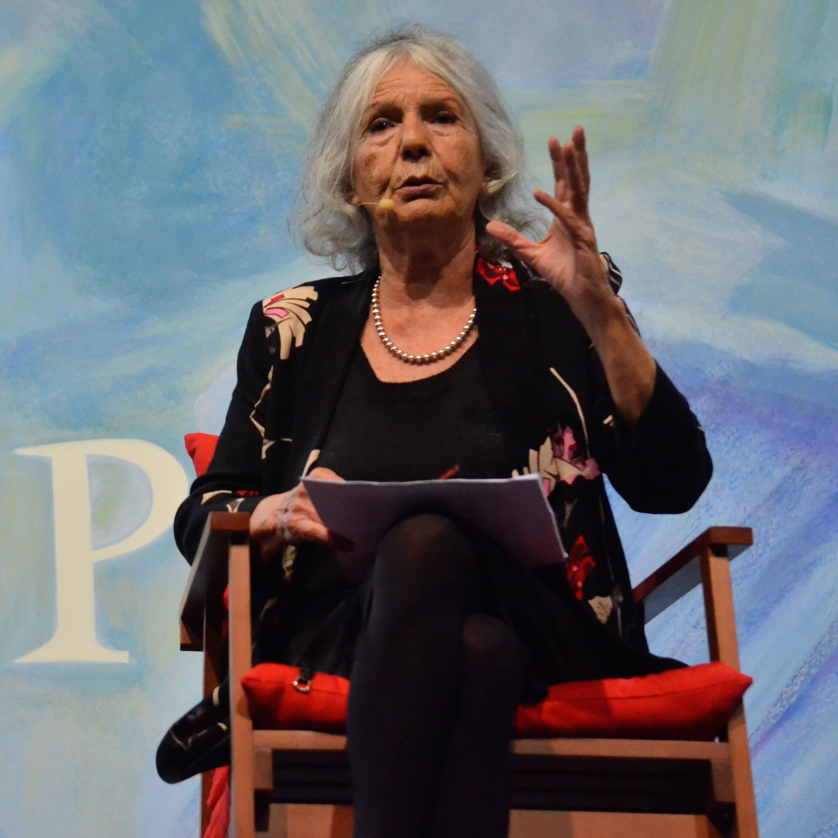 A professora Beatriz Sarlo participa da sessão de abertura da Flip 2015 - Festa Literária Internacional de Paraty, com a mesa literária: As Margens de Mário.